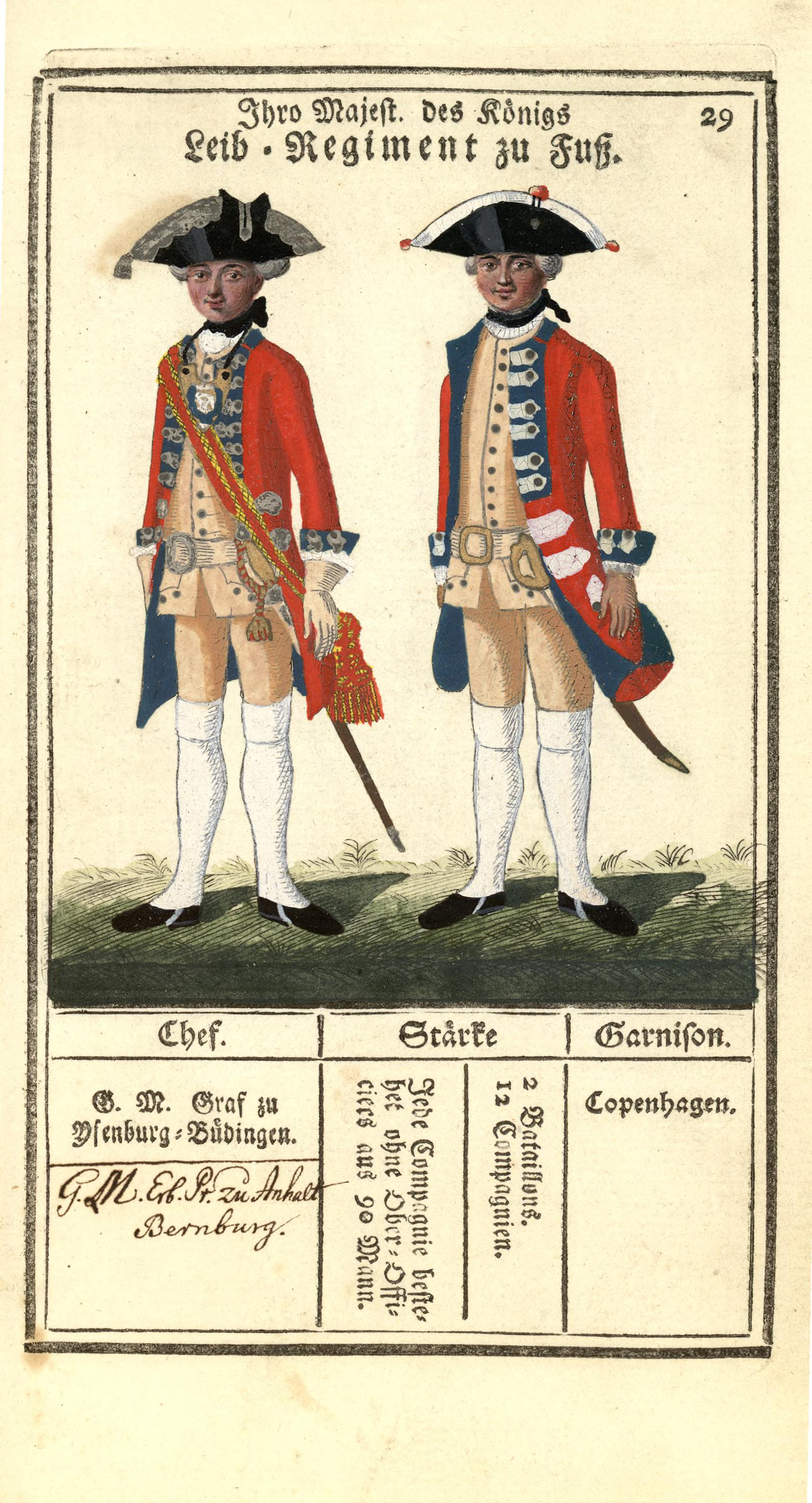 Illustrasjon hentet fra boken "Vorstellung der sämtlichen Königl. Dänischen Armee" av Bertram, Carl og utgitt av Carl Bertram (dk, 1763)